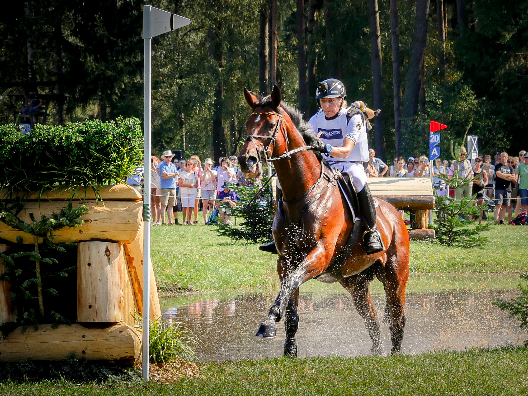 Ingrid Klimke SAP Hale-Bob Lühmühlen 2019 Vielseitigkeit